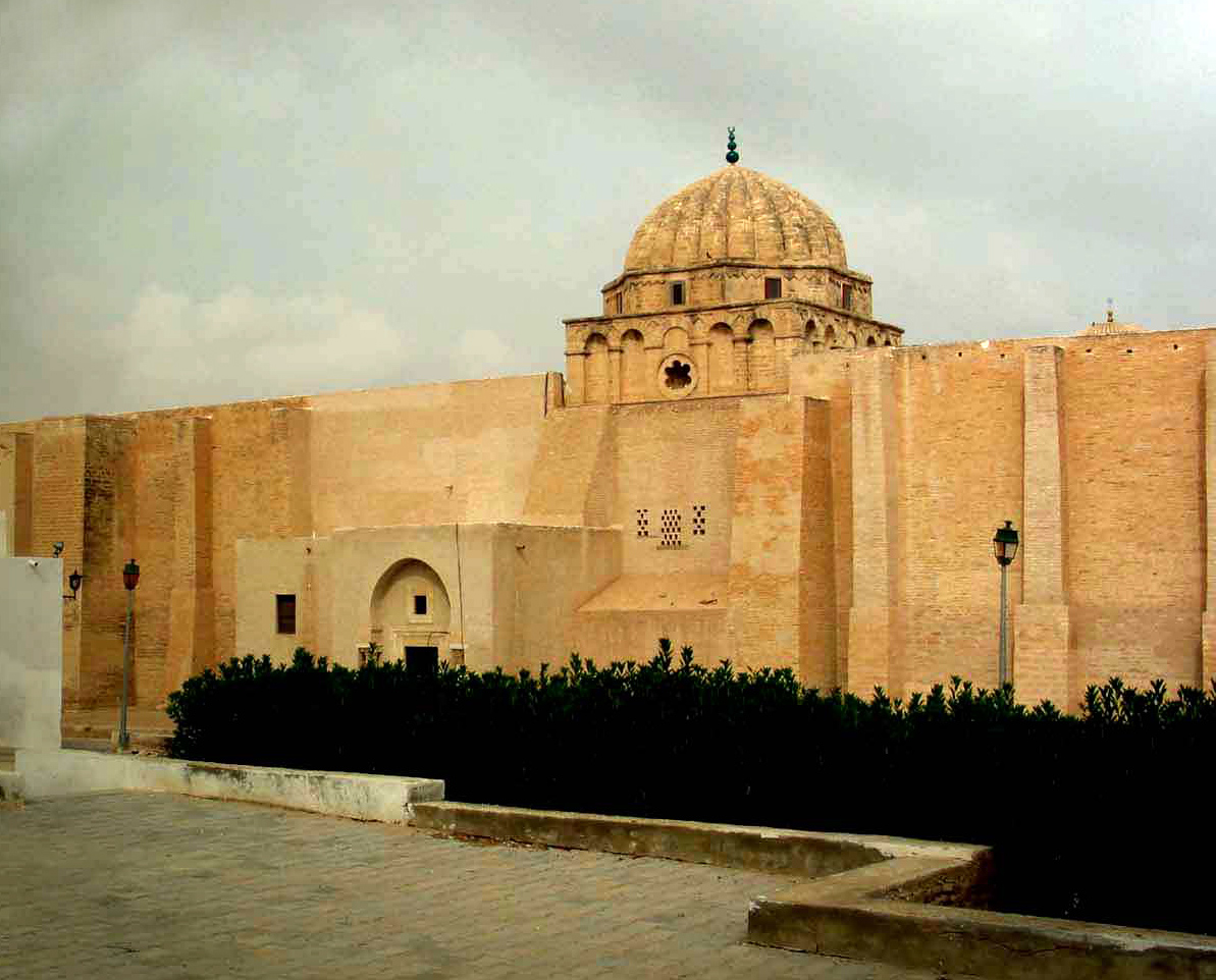 Eingang des Herrschers in die Maqsura Hauptmoschee, Qairawan